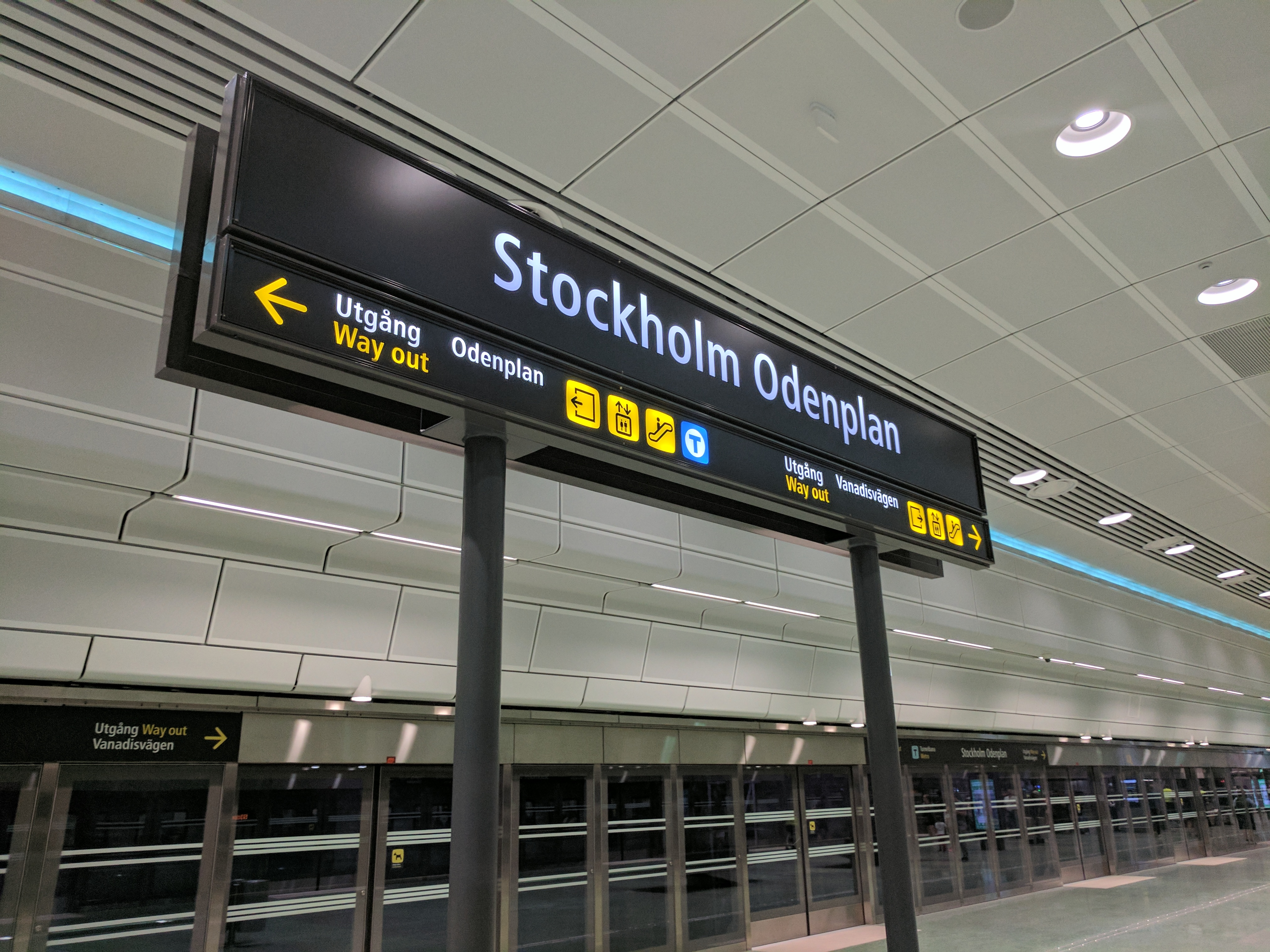 Odenplan 20170710